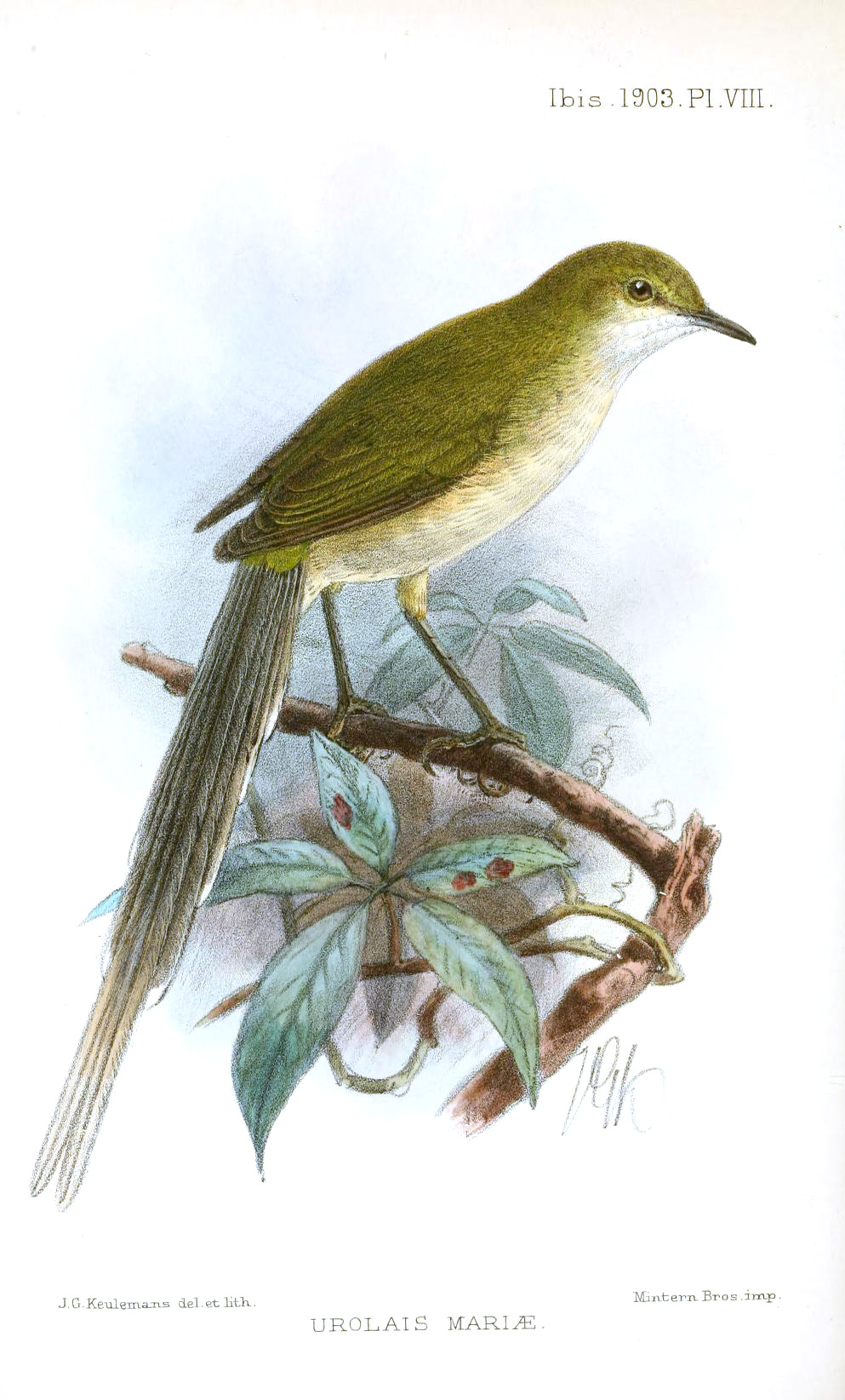 Urolais mariae (=Urolais epichlorus mariae)